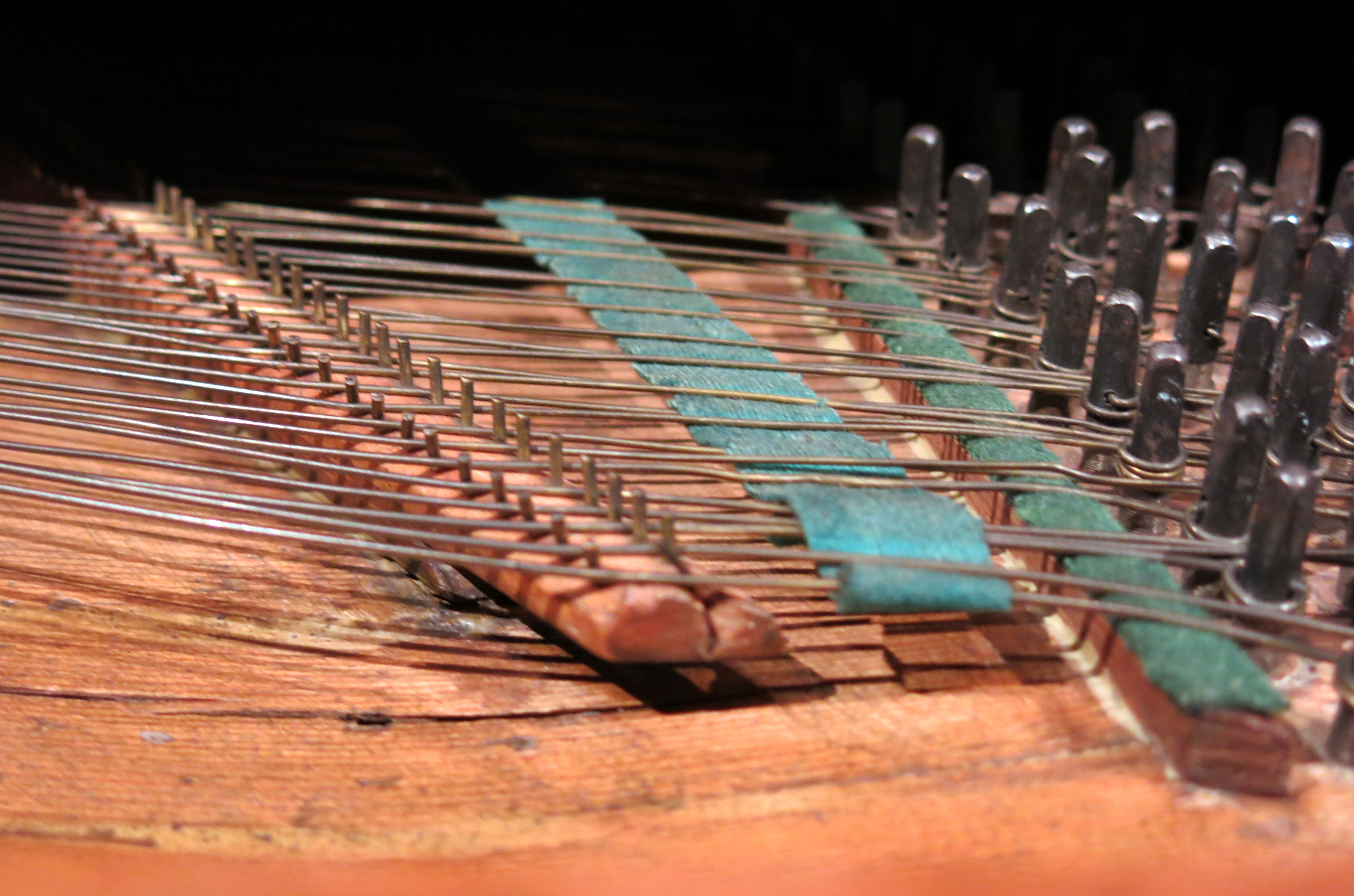 Fotografies fetes durant el Backstage pass al Museu de la Música de Barcelona, el 21-11-2013